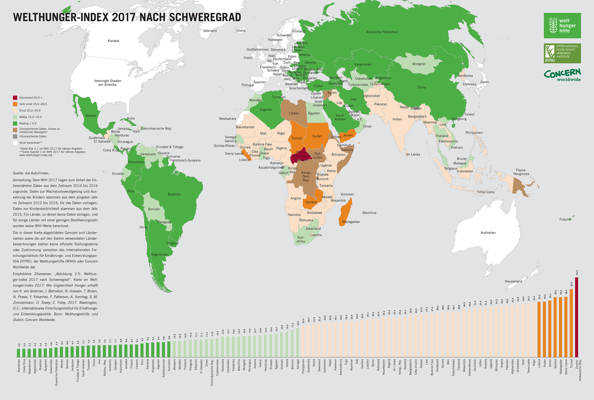 Karte des Welthunger-Index 2017 nach Schweregrad